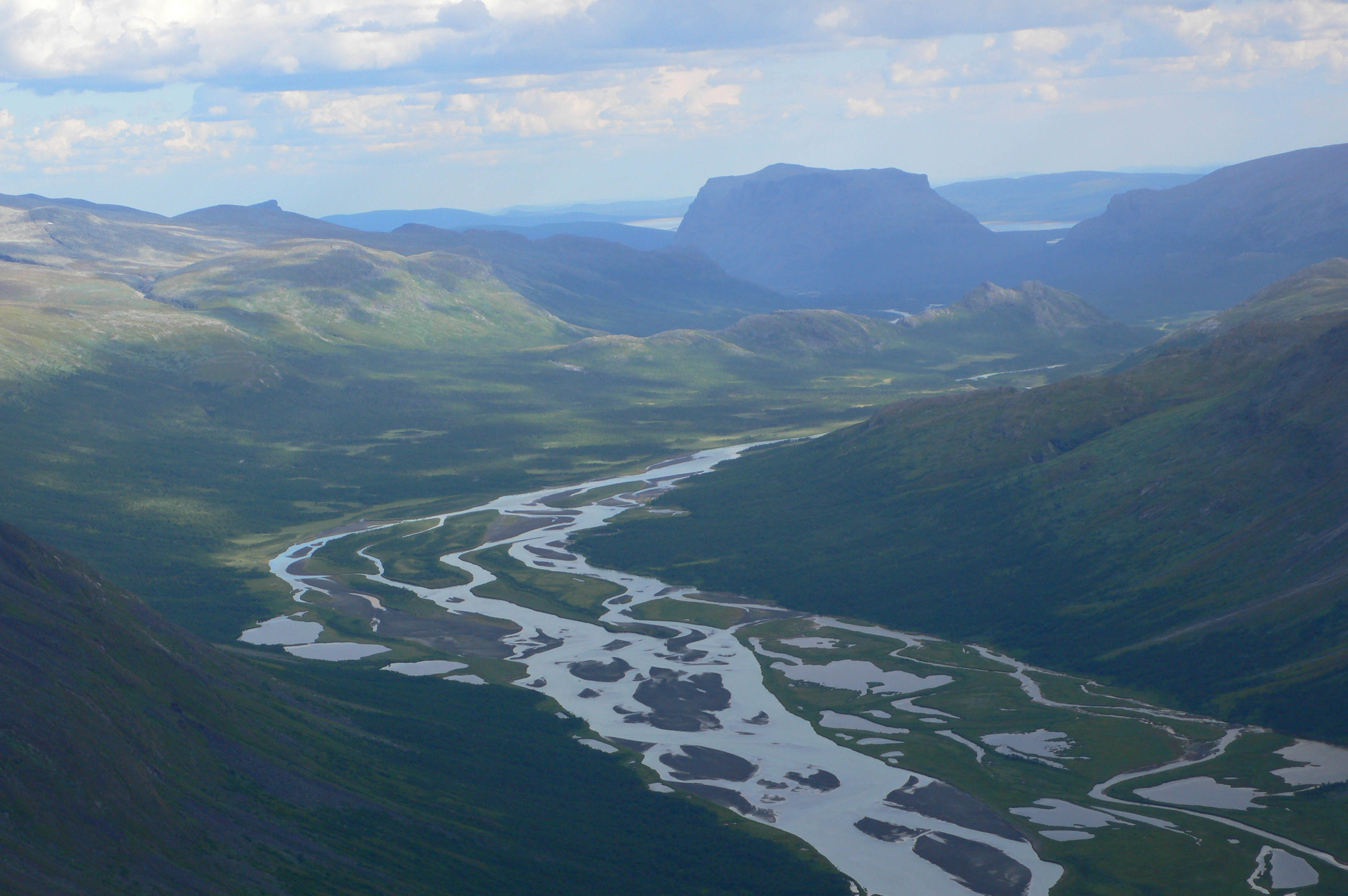 Låddebákte: Blick ins Rapadal in Richtung Süden